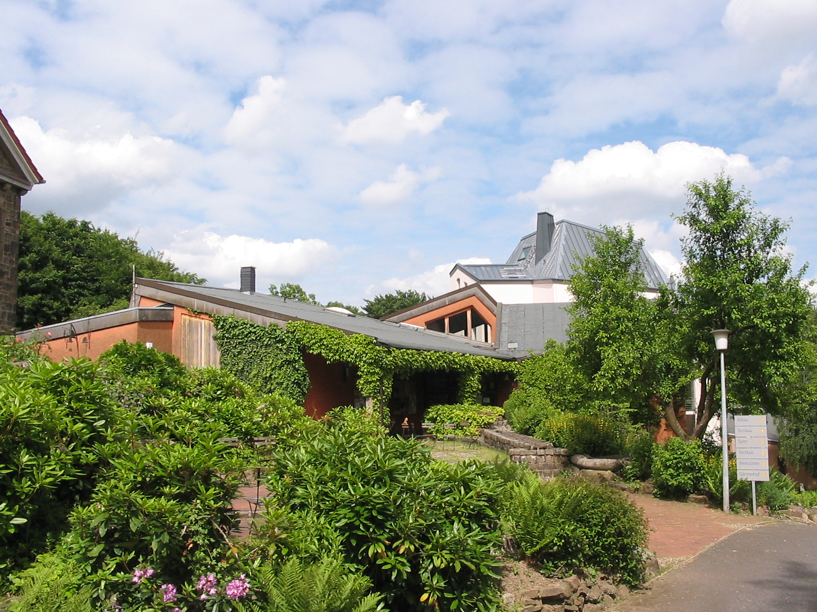 Institut für Waldorf-Pädagogik, Witten-Annen: Turmgebäude